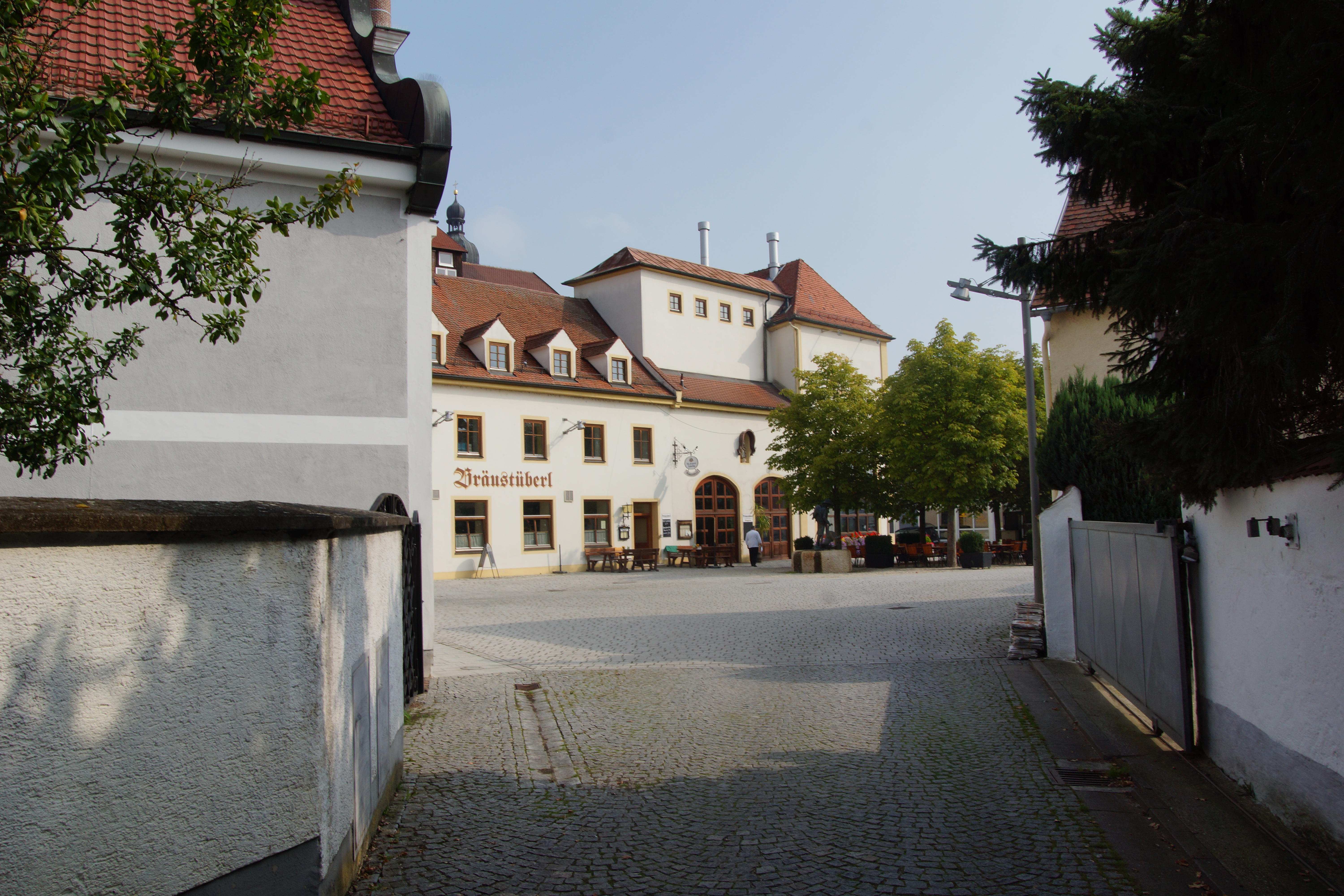 Markt Schierling im Landkreis Regensburg